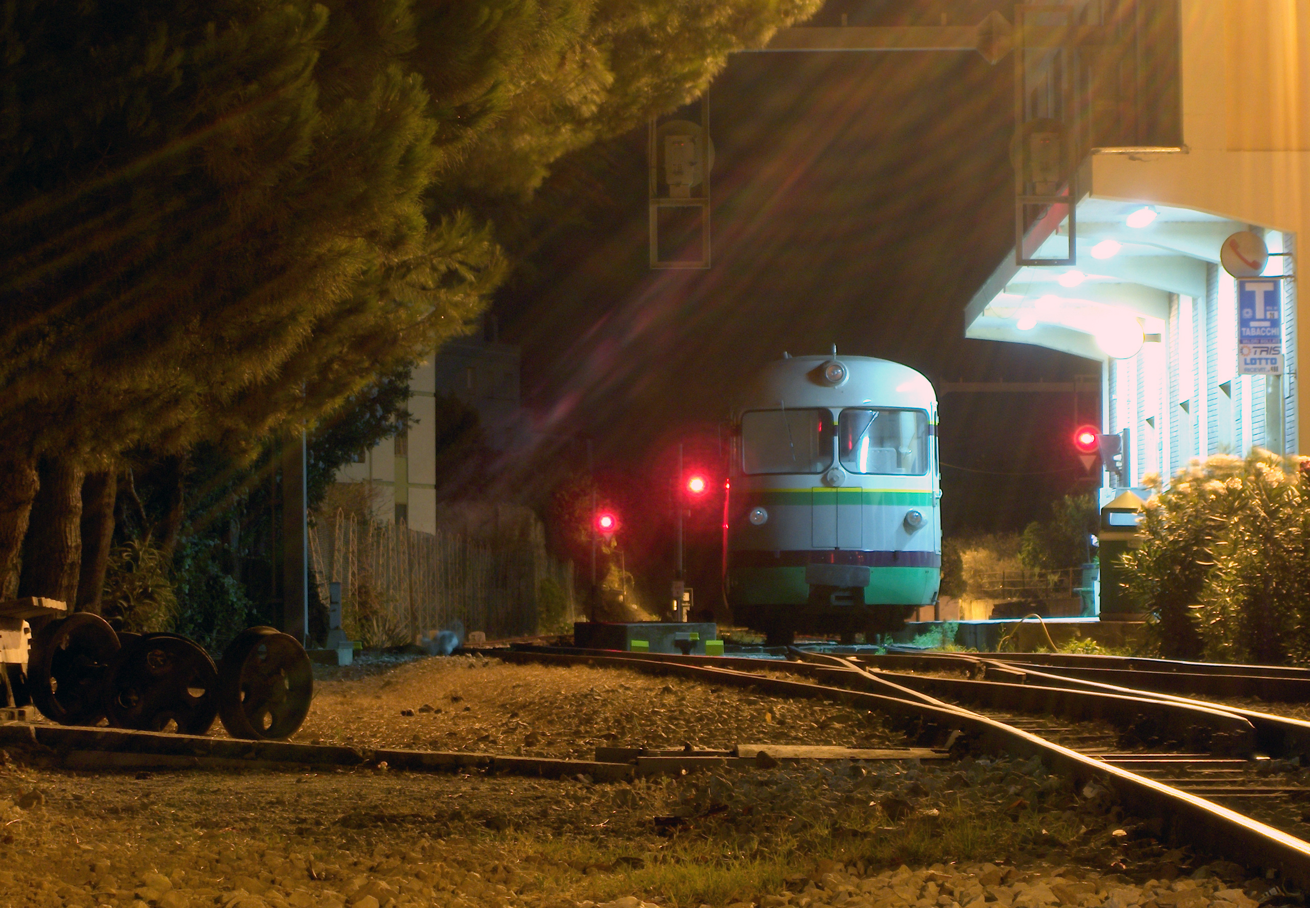 Stazione di Alghero Sant'Agostino (Alghero, Italy)